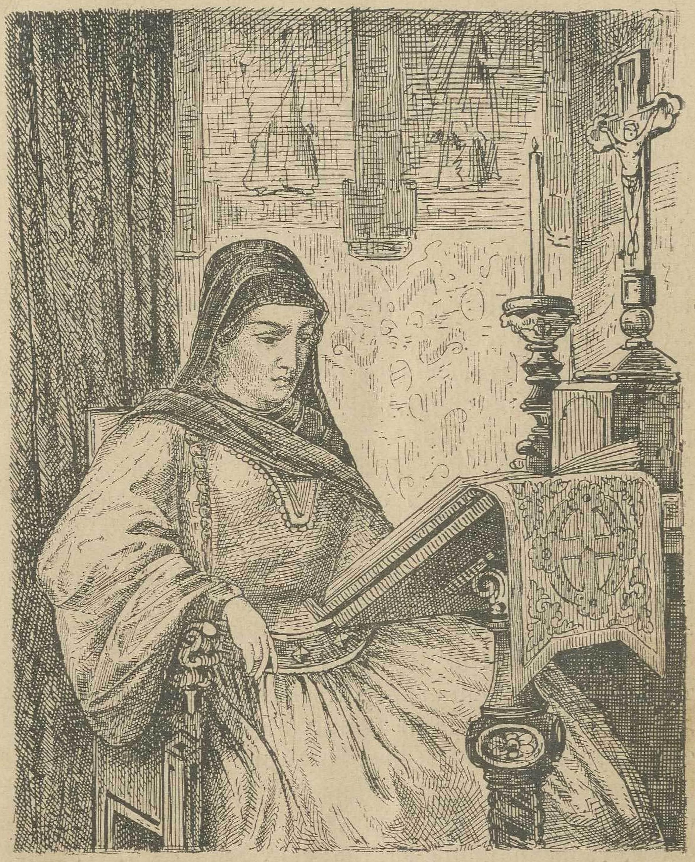 Краљица Јелена у дворцу Брњацима (Јелена Анжујска, око 1225 - 1314). новинска ксилографија.